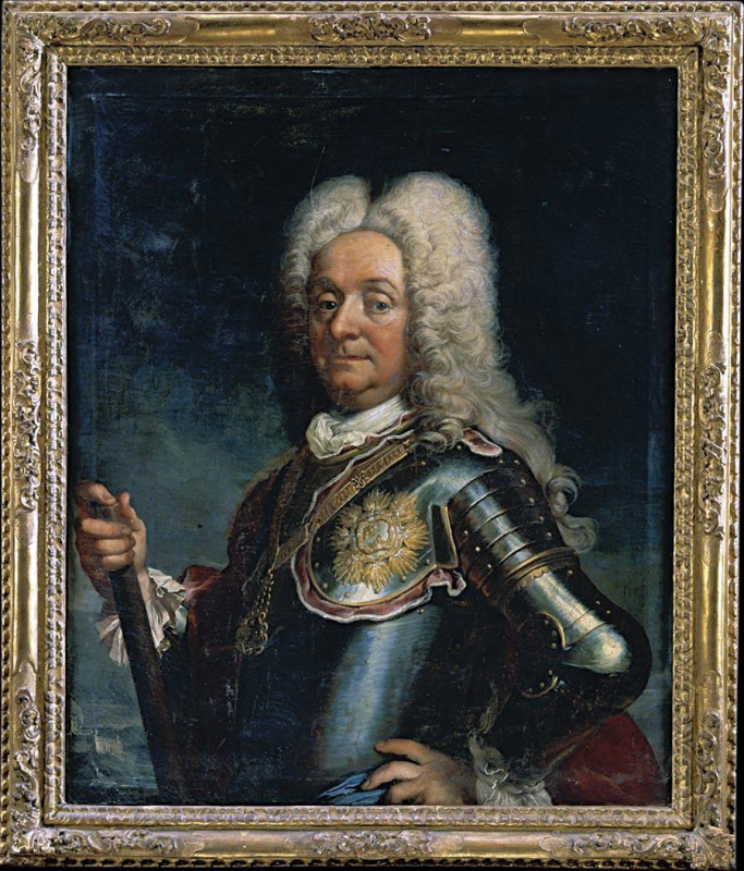 Ritratto del maresciallo Bernhard Otto von Rehbinder (1662-1742)